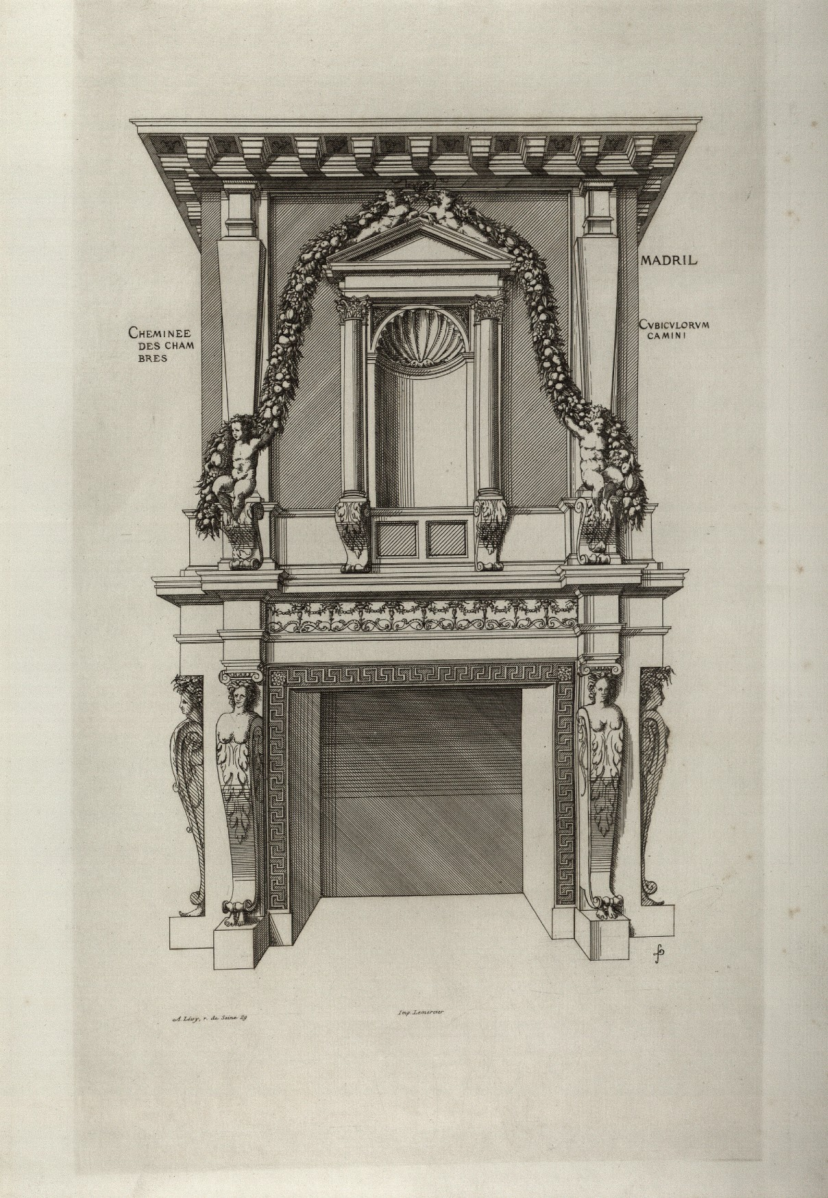 Détails intérieurs du château de Madrid. Planche tirée de l'ouvrage d'Androuet du Cerceau Les plus excellents bastiments de France